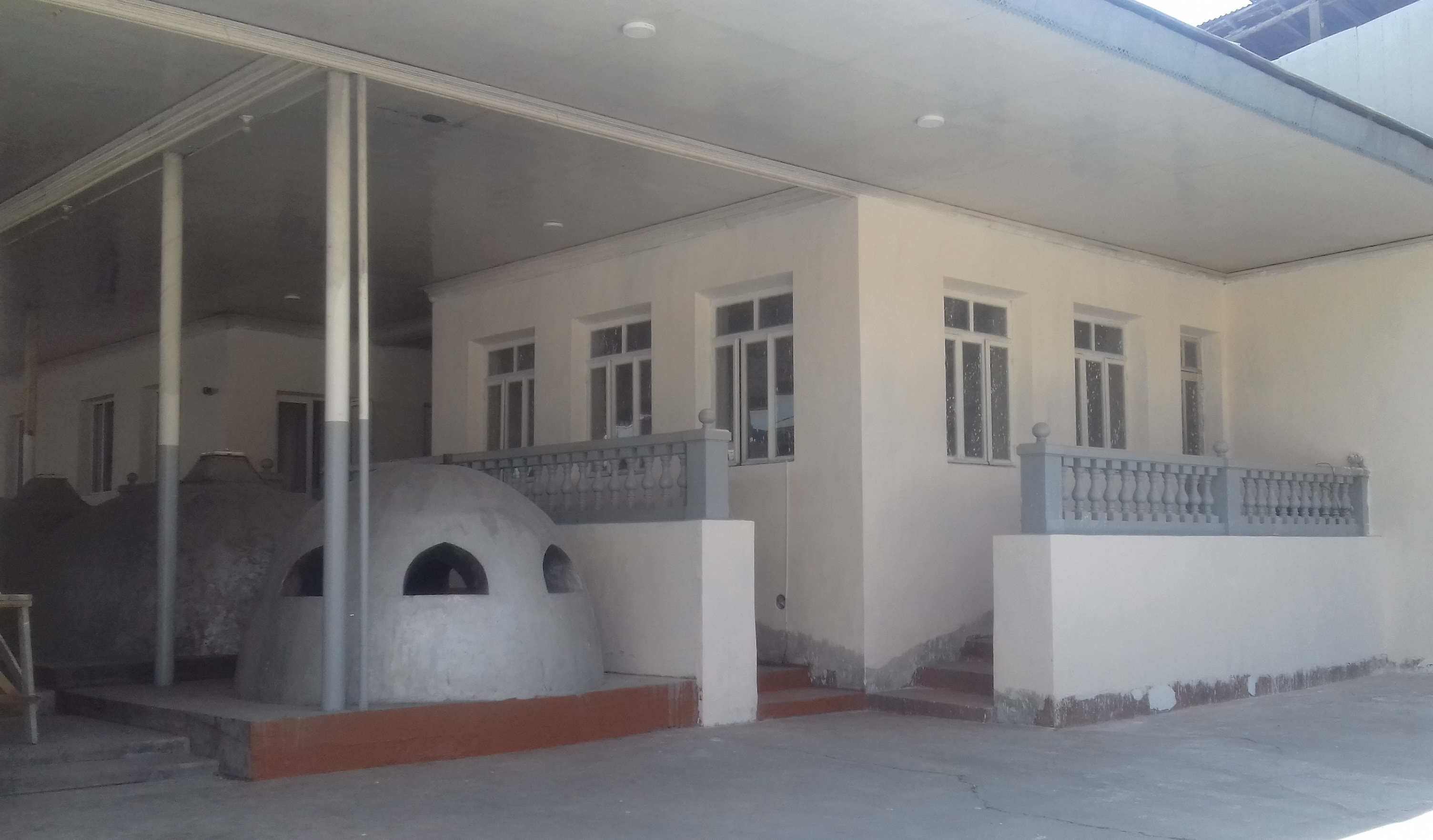 Хаммами Давуди в Самарканде